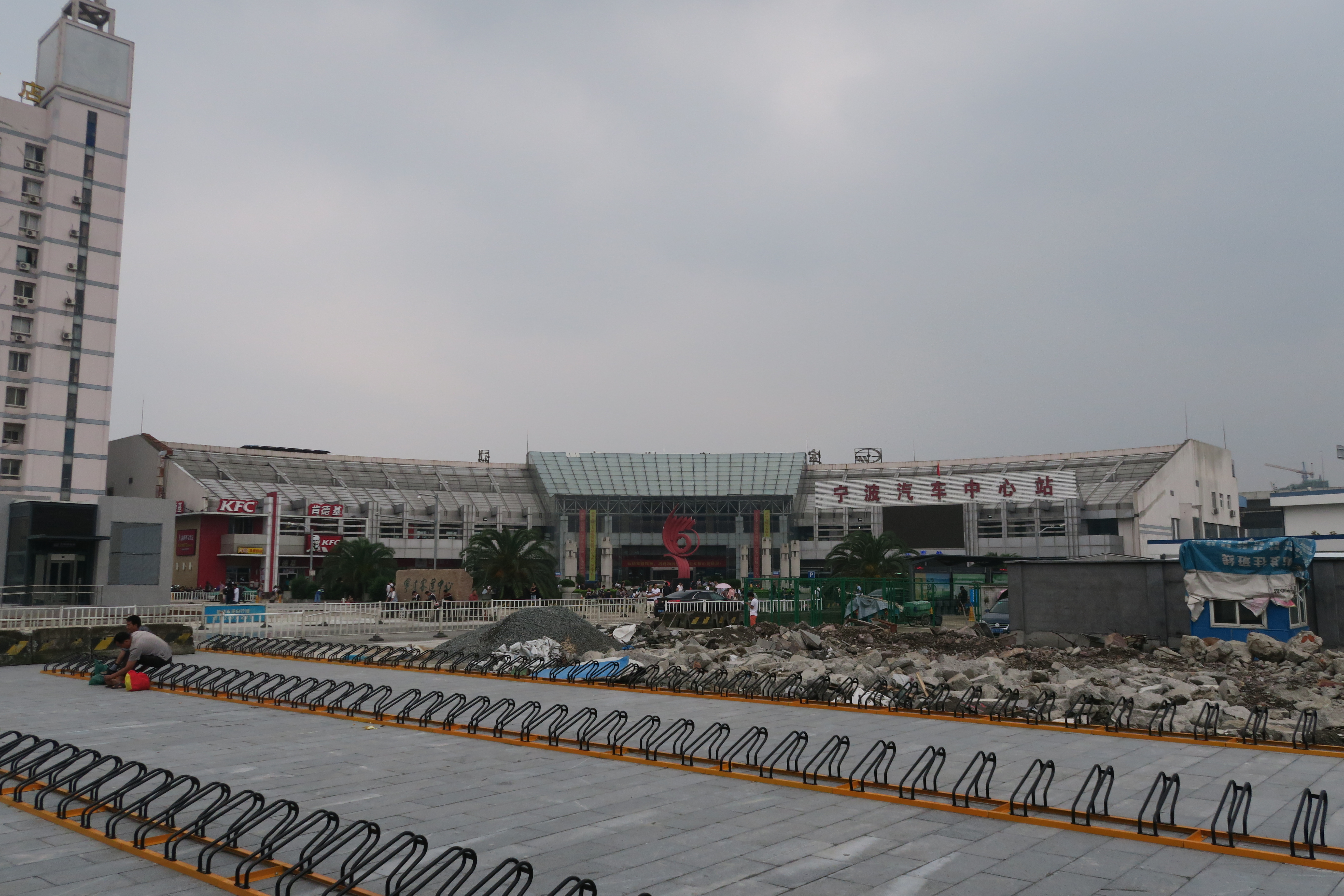 宁波客运中心